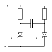 Komutační obvod tyristoru